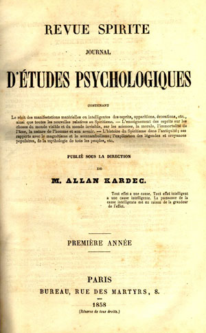 Frontispício da primeira edição da Revue Spirite, sob a direção de Allan Kardec (janeiro de 1858).